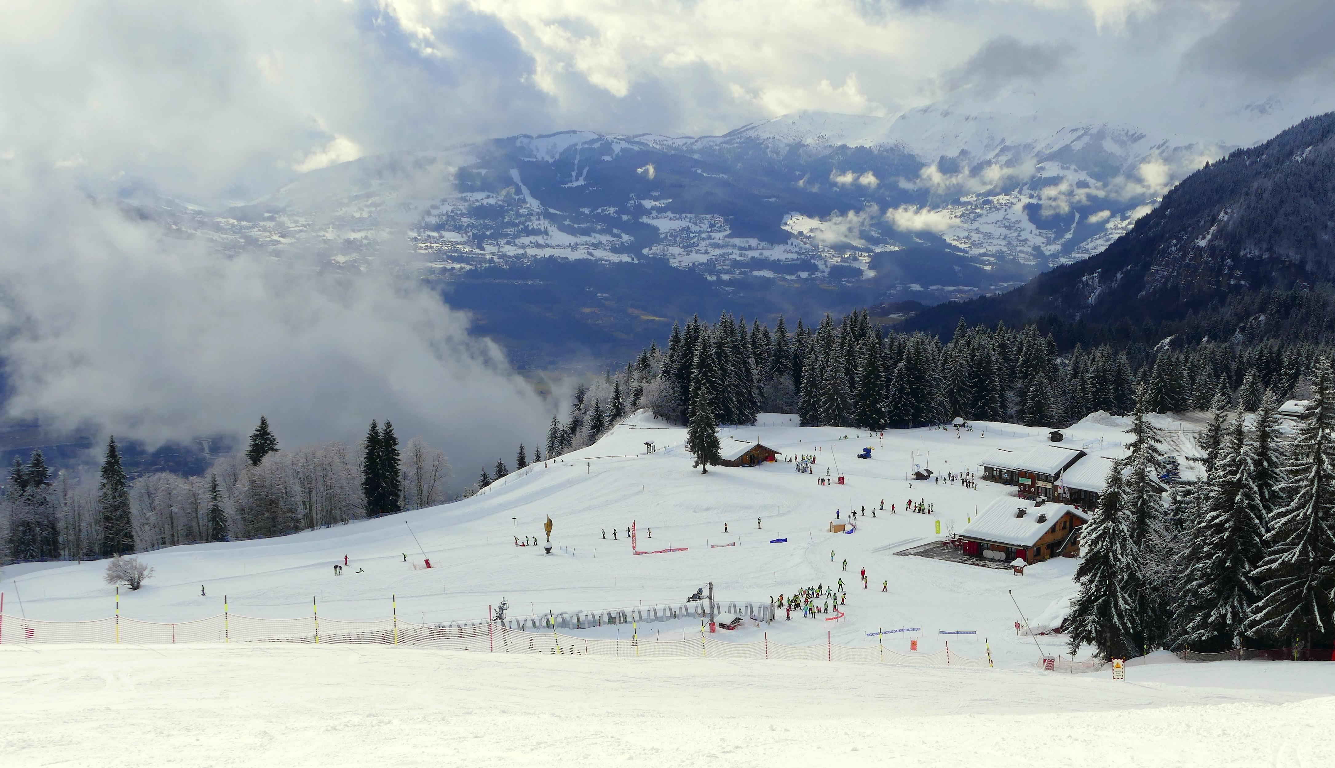 Station de Plaine-Joux (Passy, Haute-Savoie, France)?. Rassemblement d'enfants de classe de neige.